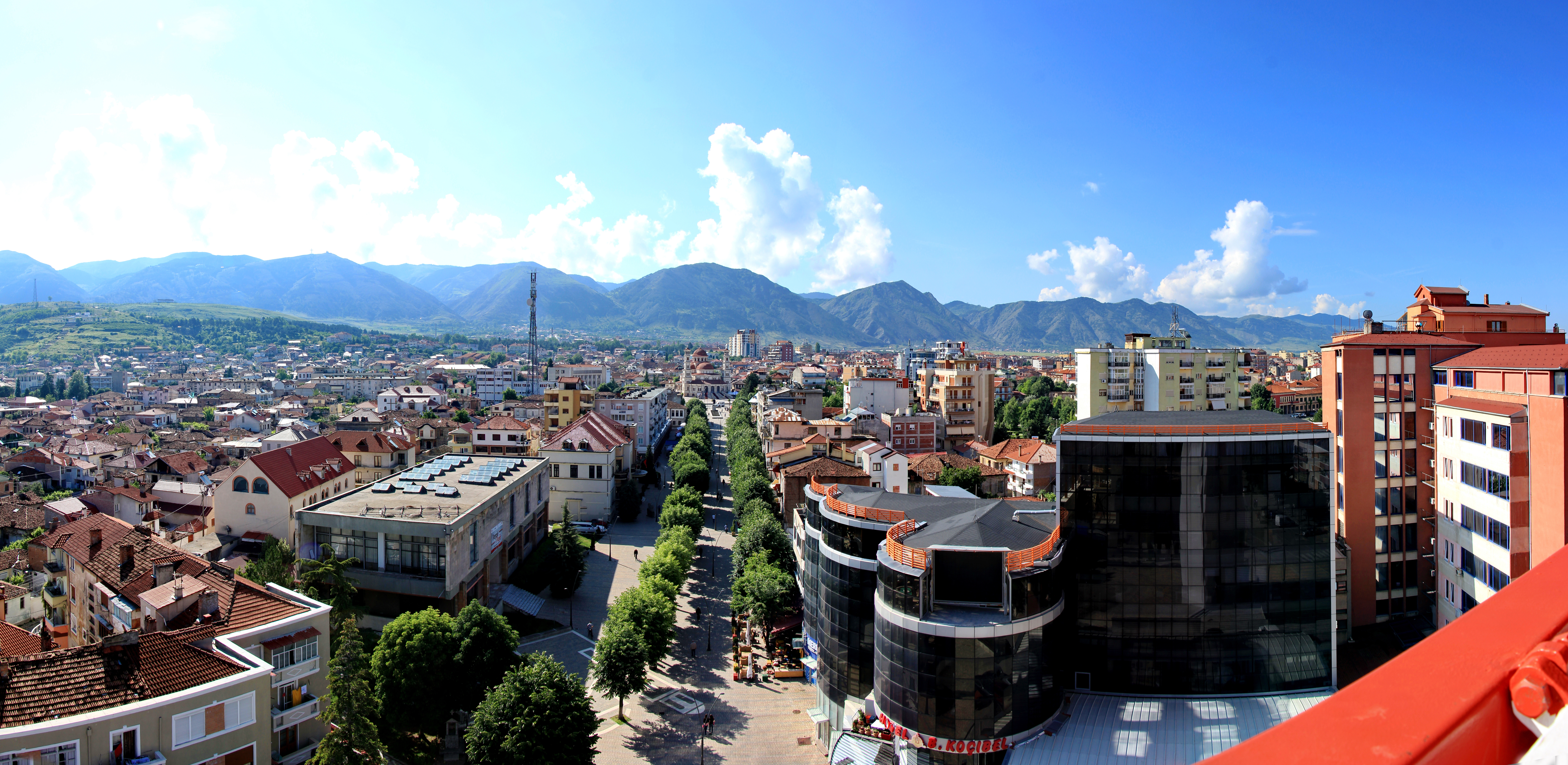 Kalaja e Bilishtit